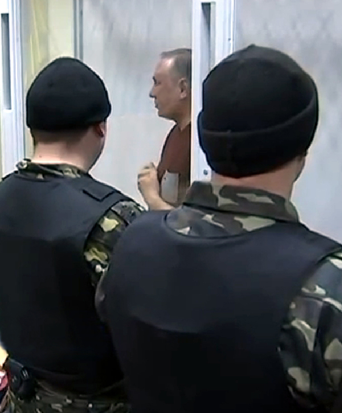 Олександр Єфремов у Печерському районному суді Києва під час обрання запобіжного заходу.